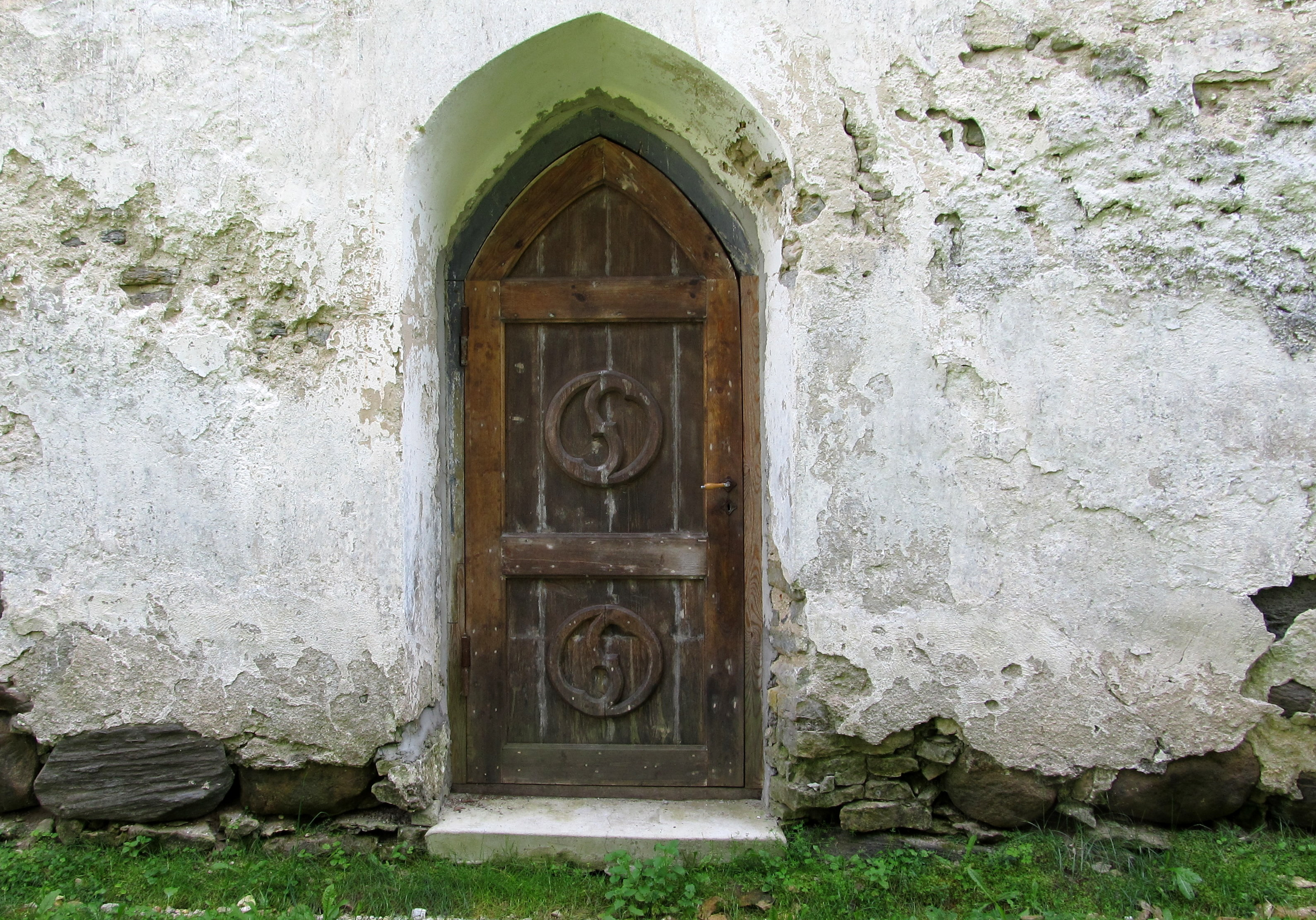 Kirbla kiriku uks